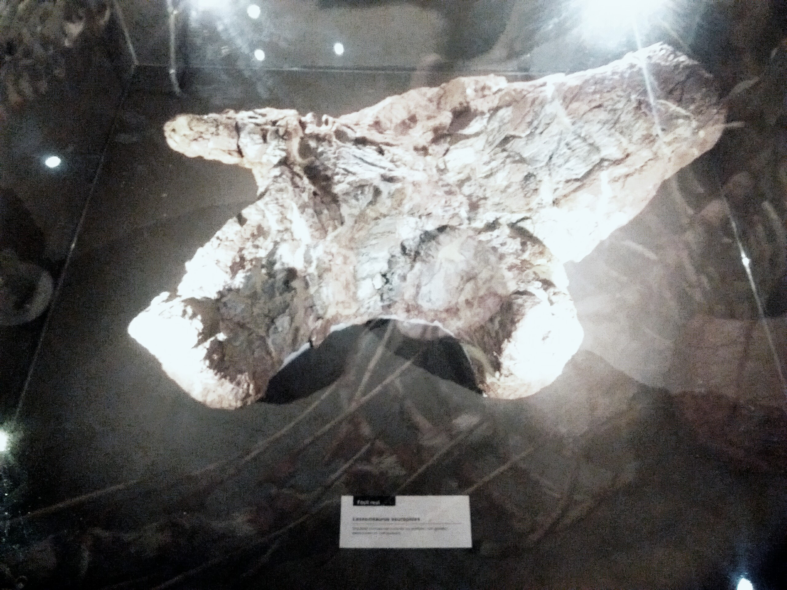 Pieza fósil de un Lessemsaurus